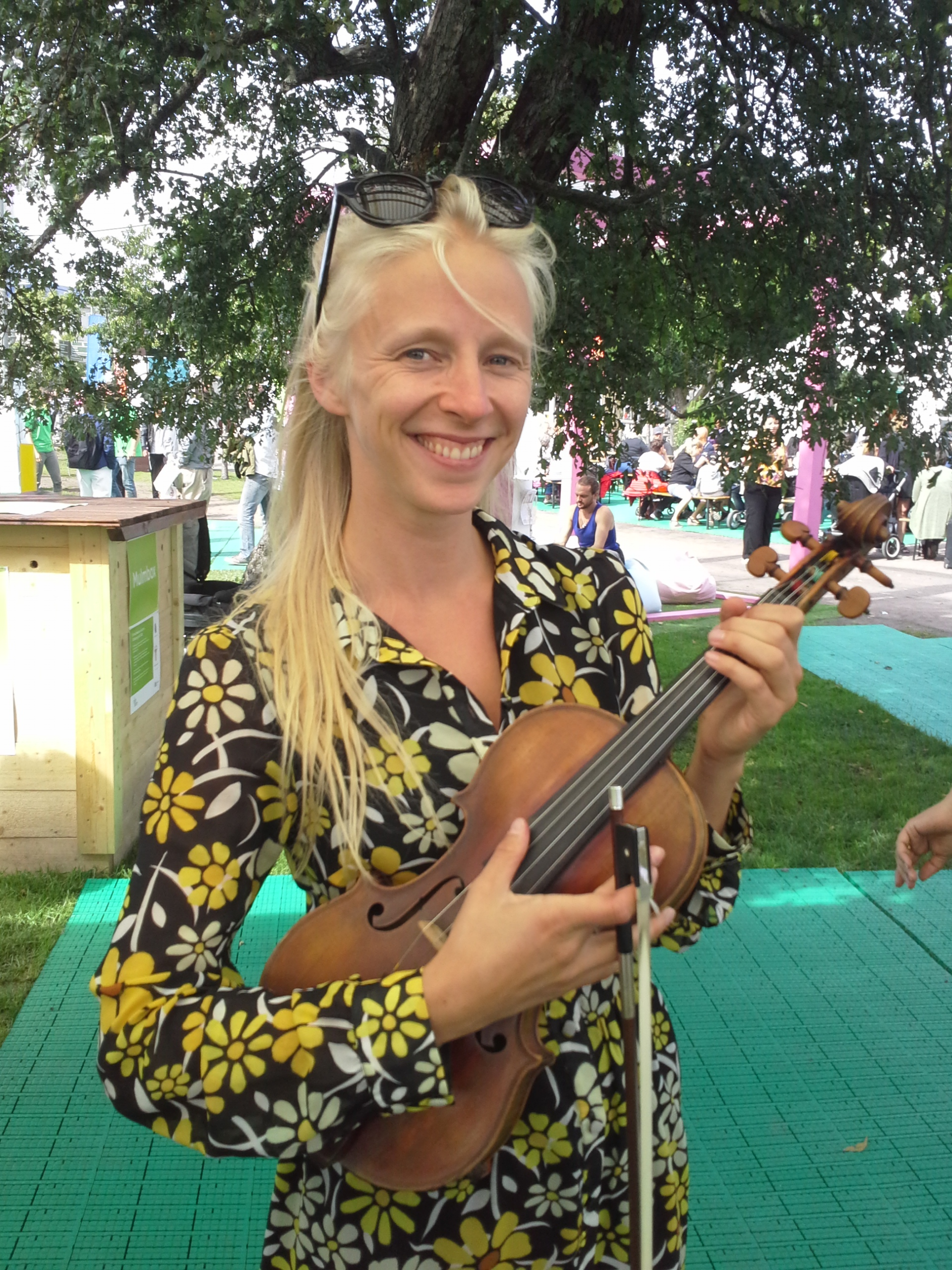 Lena Jonsson med sin fiol efter en spelning på Kulturkalaset i Göteborg den 17 augusti 2017.